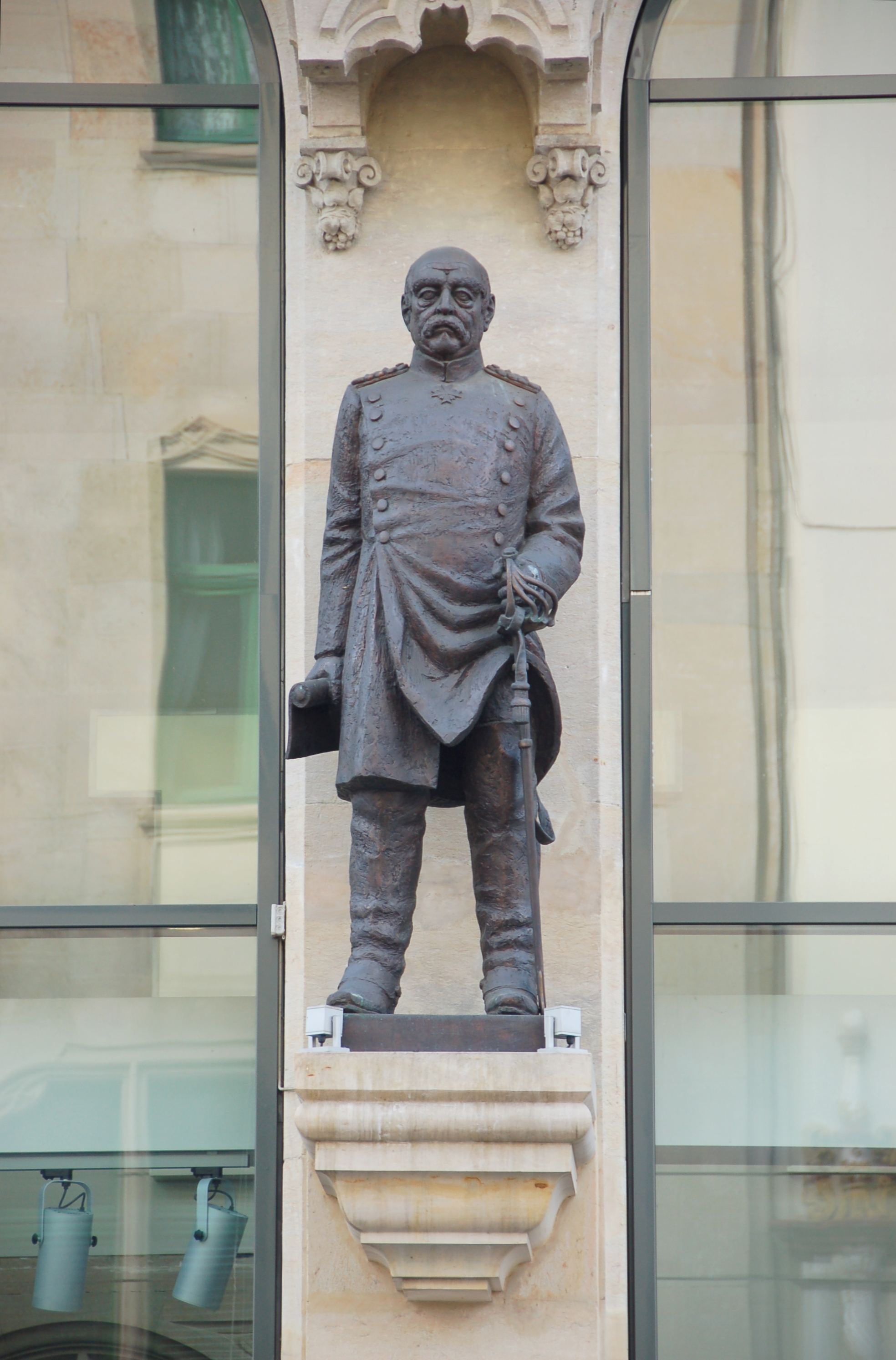 Statue am Erfurter Bismarckhaus